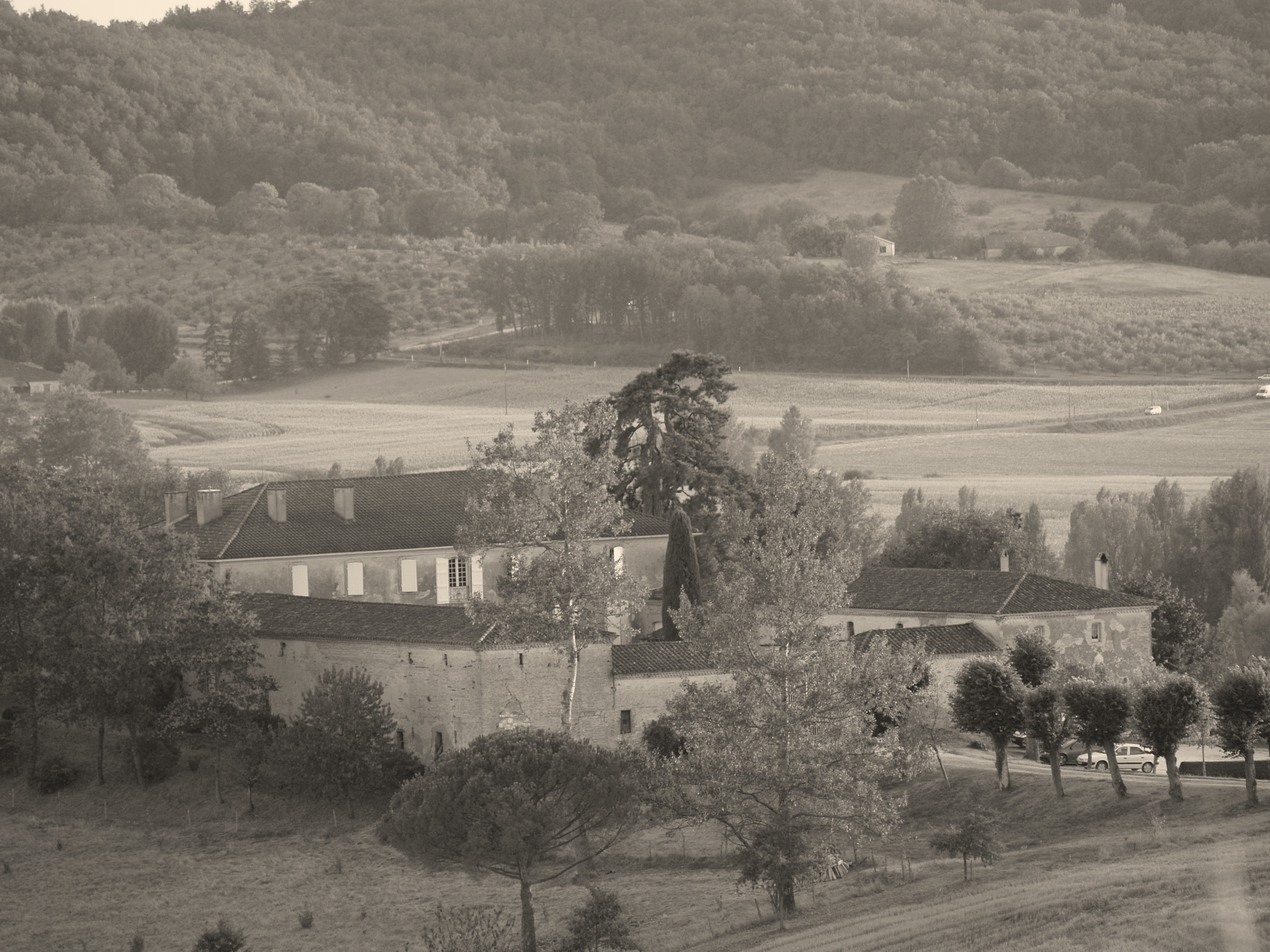 Château de Rodier .